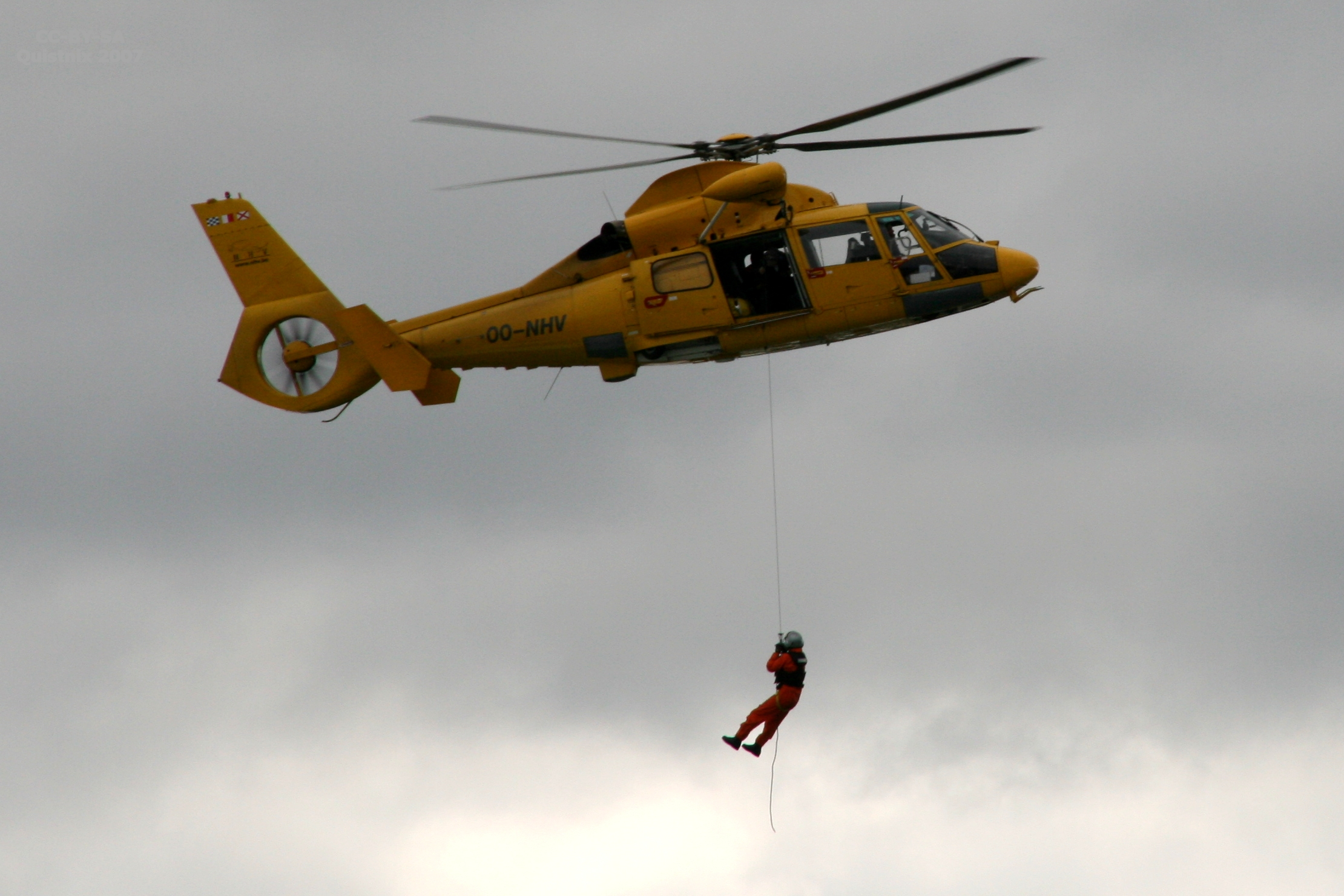 Loods hangend onder helicopter, Wereldhavendagen Rotterdam